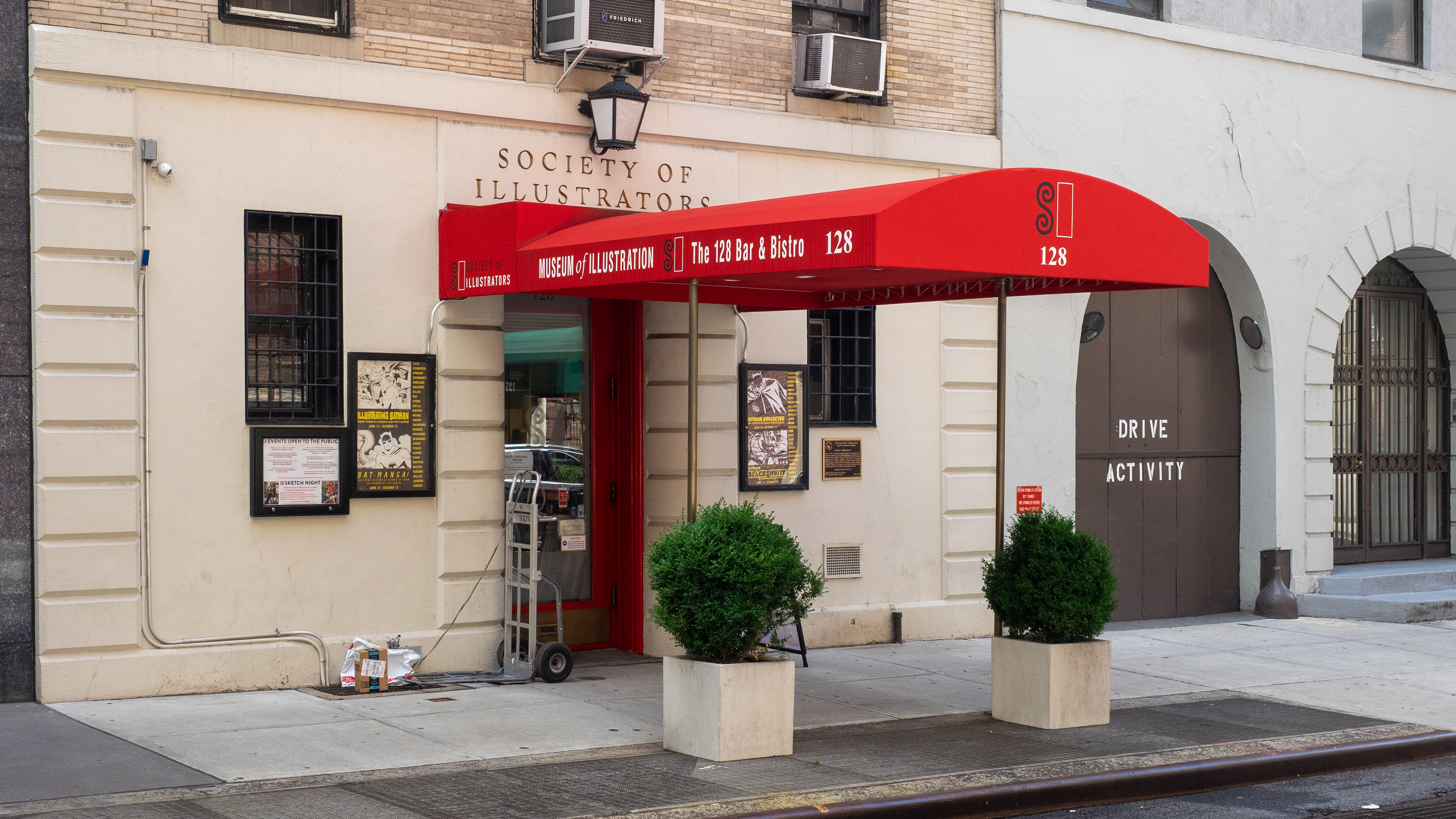 Upper East Side, NYC